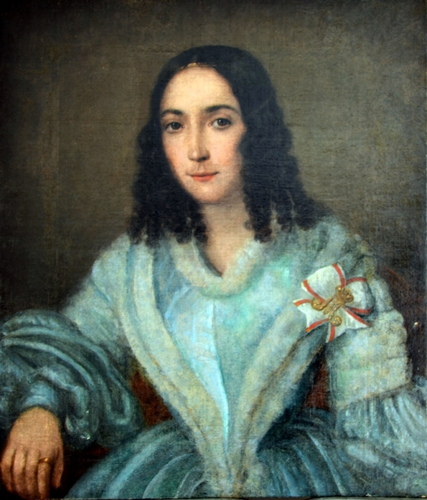 Портрет неизвестной с шифром выпускницы-отличницы Екатерининского института. Поступил в Сызранский краеведческий музей из усадьбы Насакиных в деревне Губино. Предположительно портрет Натальи Александровны Дмитриевой, окончившей в 1838 году Екатерининский институт с золотым шифром малой величины.